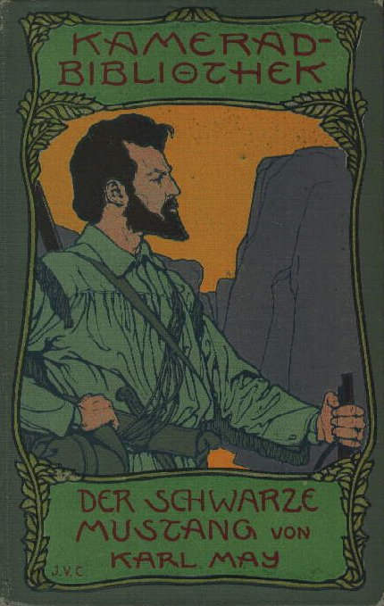 Deckelbild der ersten Buchauflage von Karl Mays Der schwarze Mustang, das später auch unter dem Titel Halbblut veröffentlicht wurde.